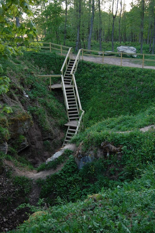 Karvės Ola – karstinė smegduobė su ola, esanti Karajimiškio kaime (Biržų rajonas), Biržų regioniniame parke